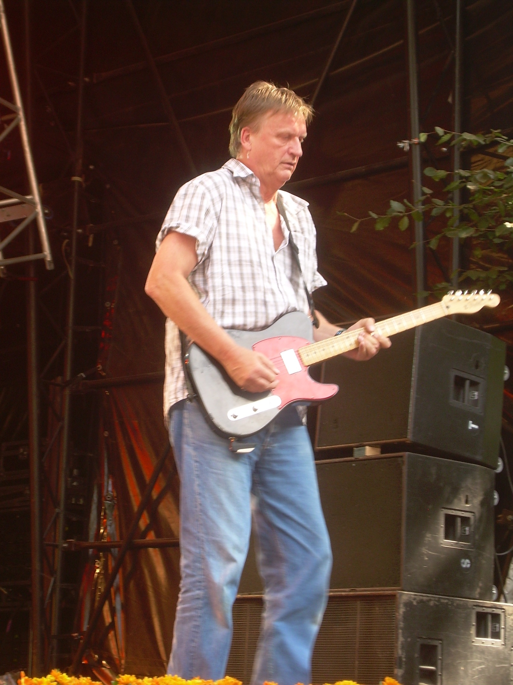 Photo of danish musician Henrik Strube taken at Skanderborg Festival 2007, Denmark